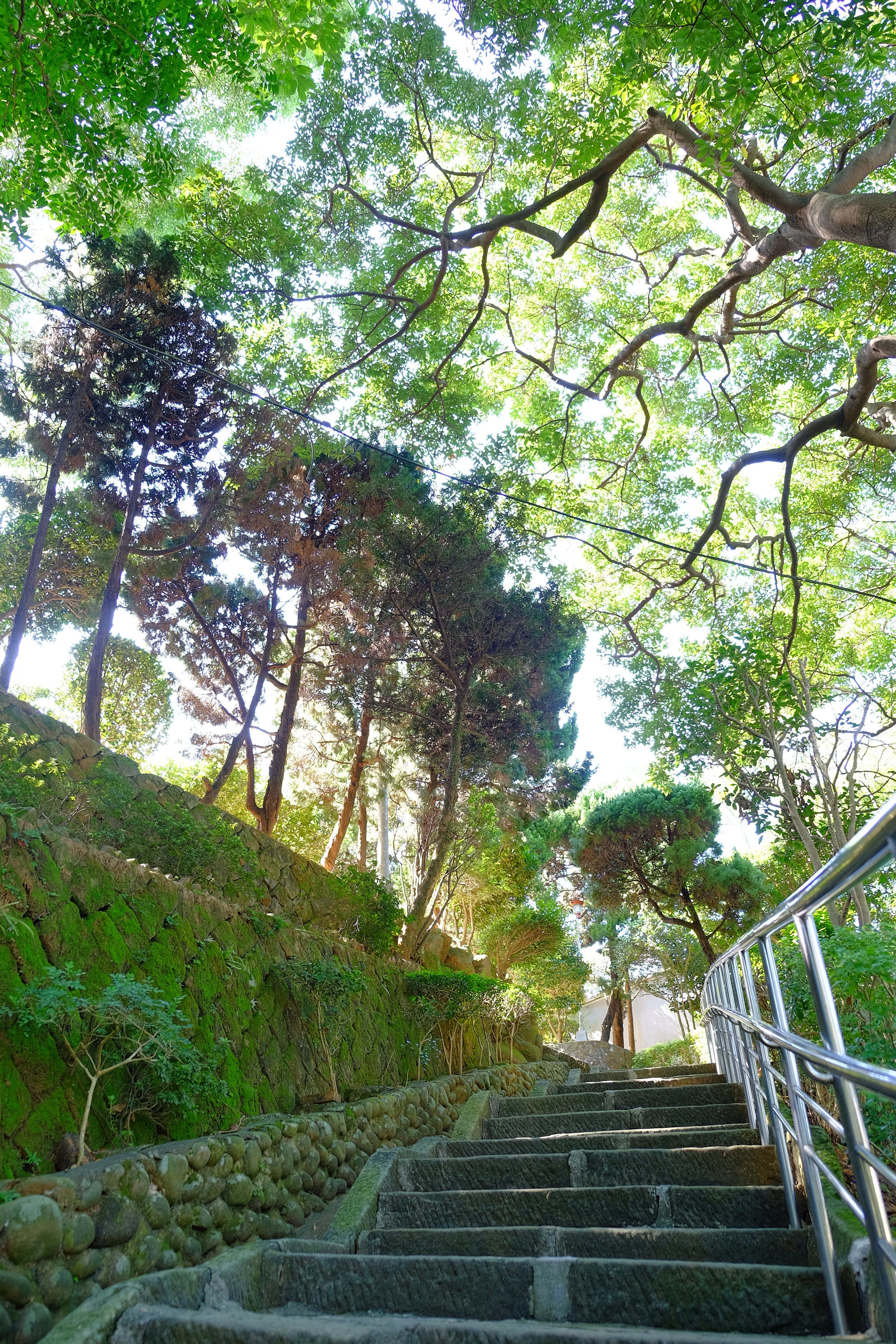 2017Puji Temple Taipei參道